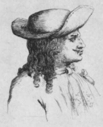 De Brie, de son vrai nom Edme Villequin, était un comédien français, né à Ferrières-en-Brie le 24 octobre 1607, et décédé le 9 mars 1676 à Paris, dans sa maison de la rue Guénégaud. Il fit partie de la troupe de Molière depuis au moins 1650, et il y resta jusqu'à sa mort.